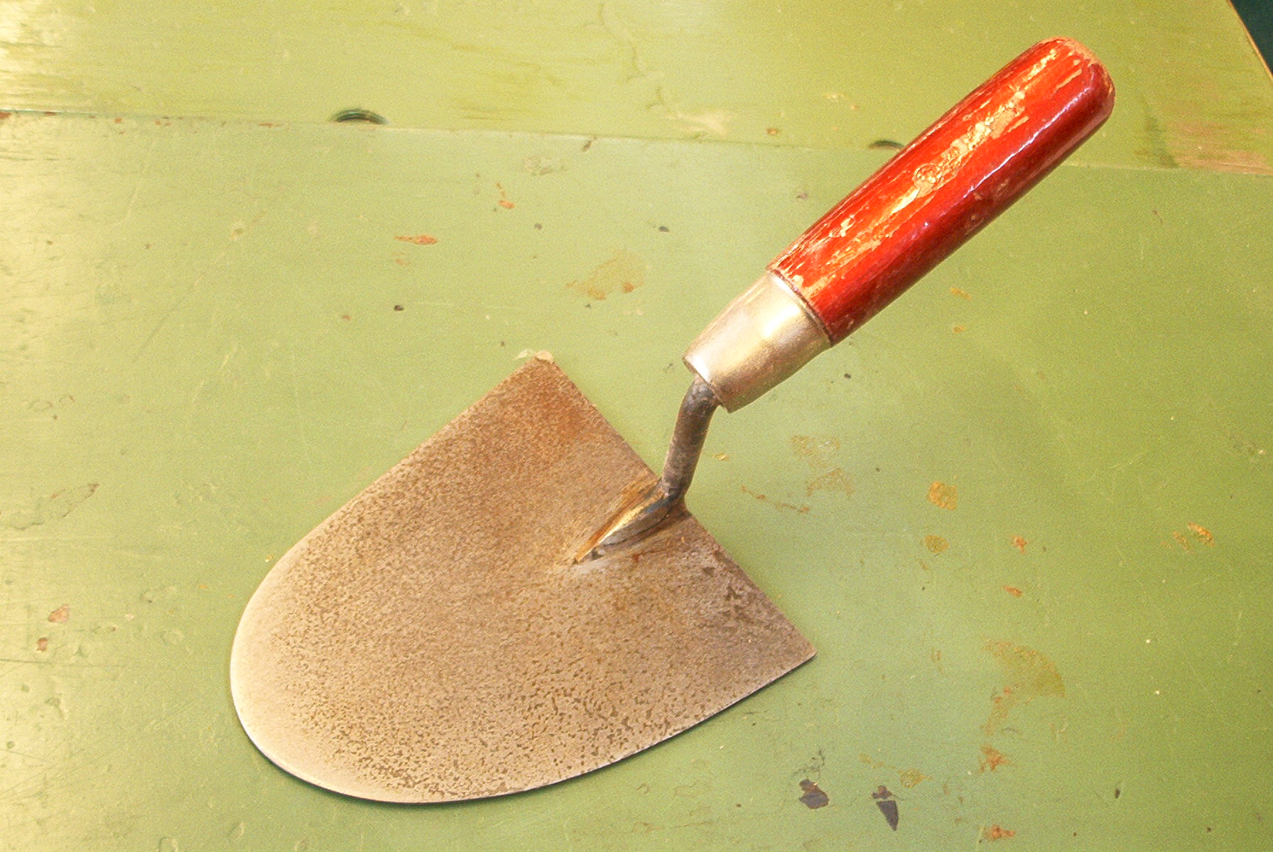 zelfgemaakte foto bestemd voor publiek domein. Martink